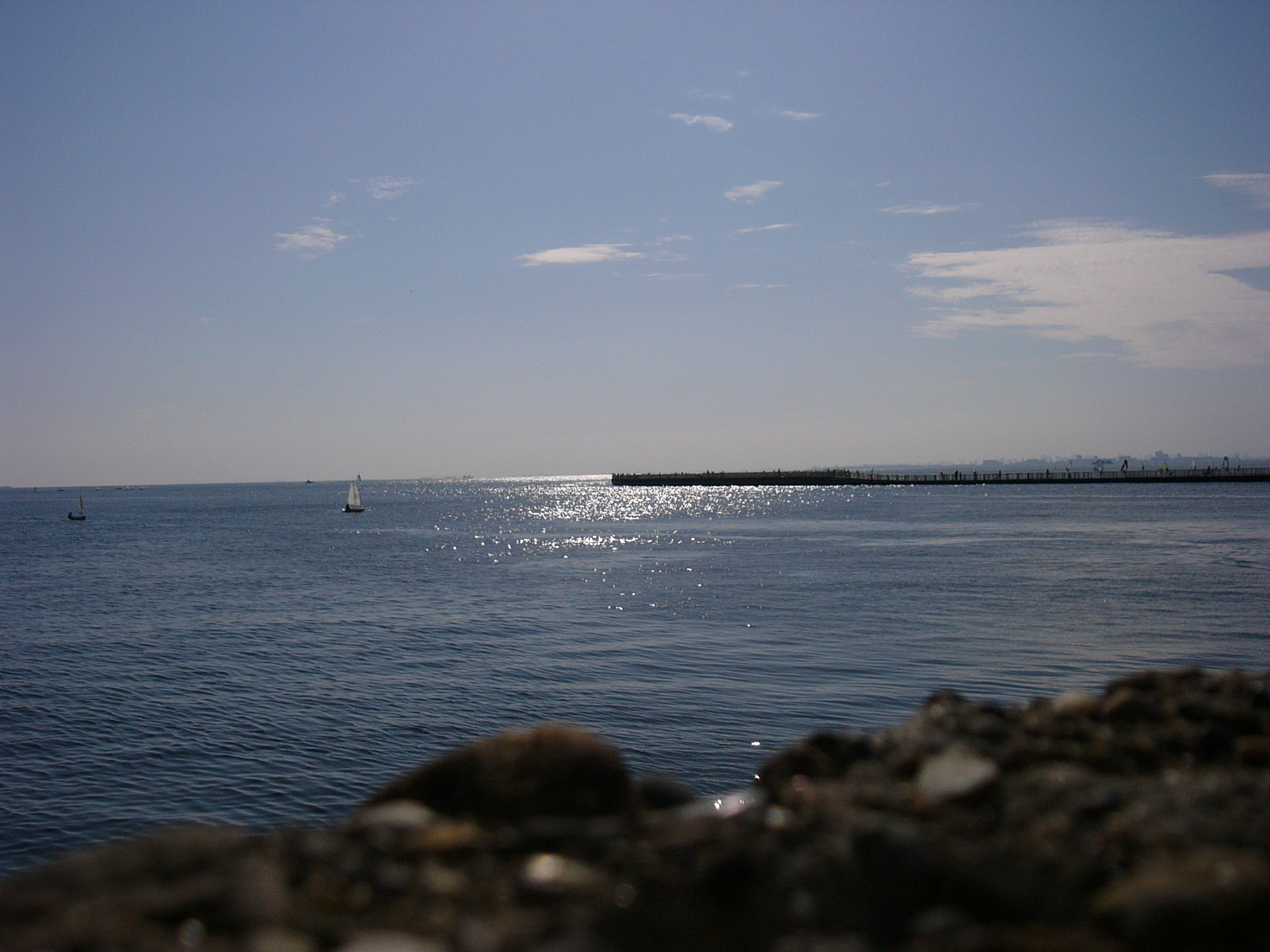 稲毛海浜公園